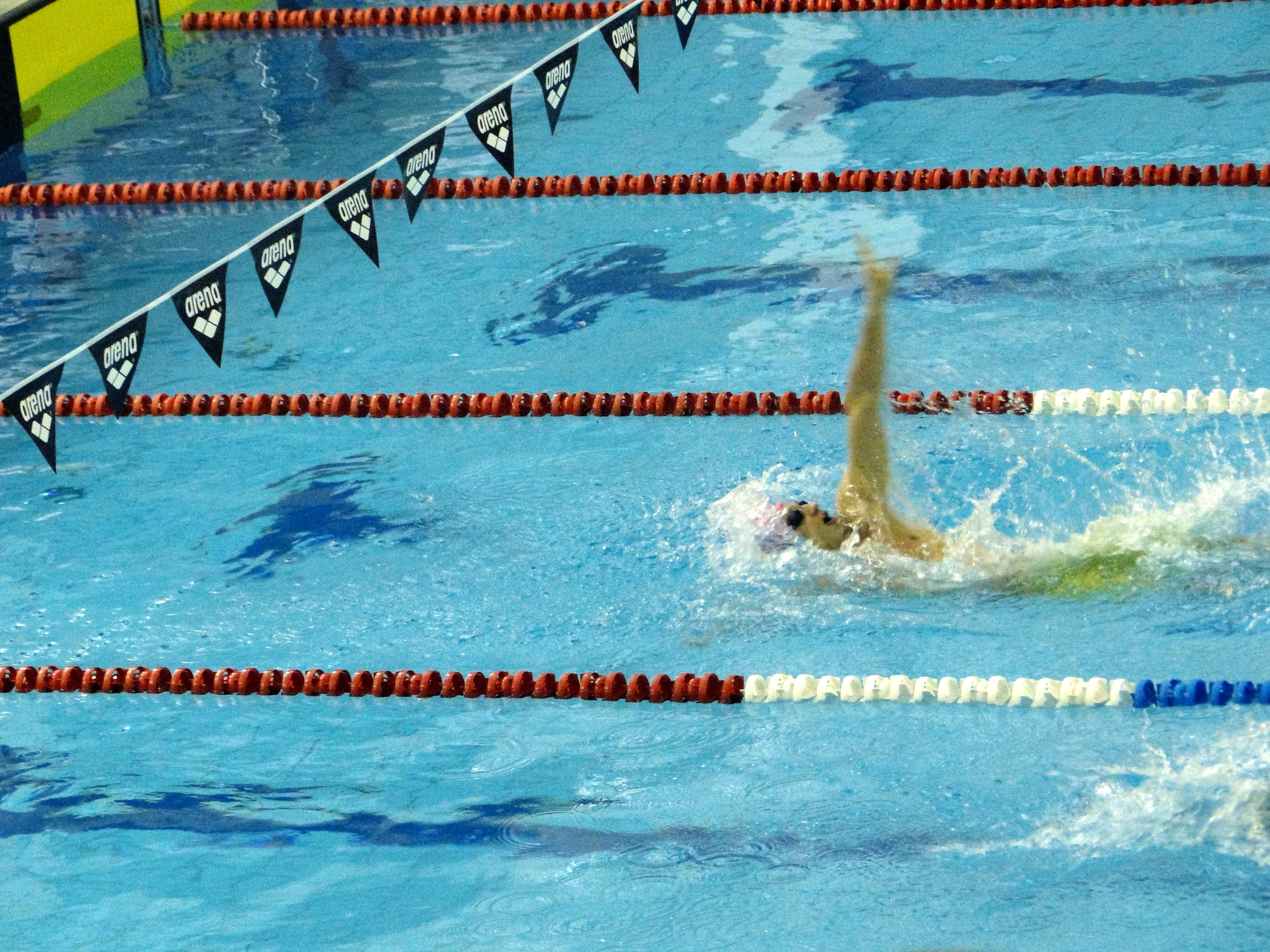 Runda Grand Prix Polski w Pływaniu 2012 na pływalni AWF w Krakowie